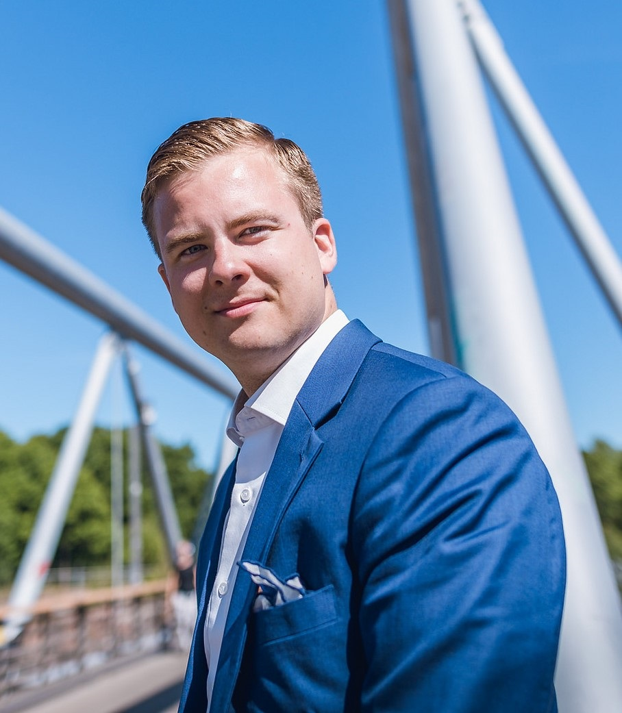 Otto Meri kesällä 2018